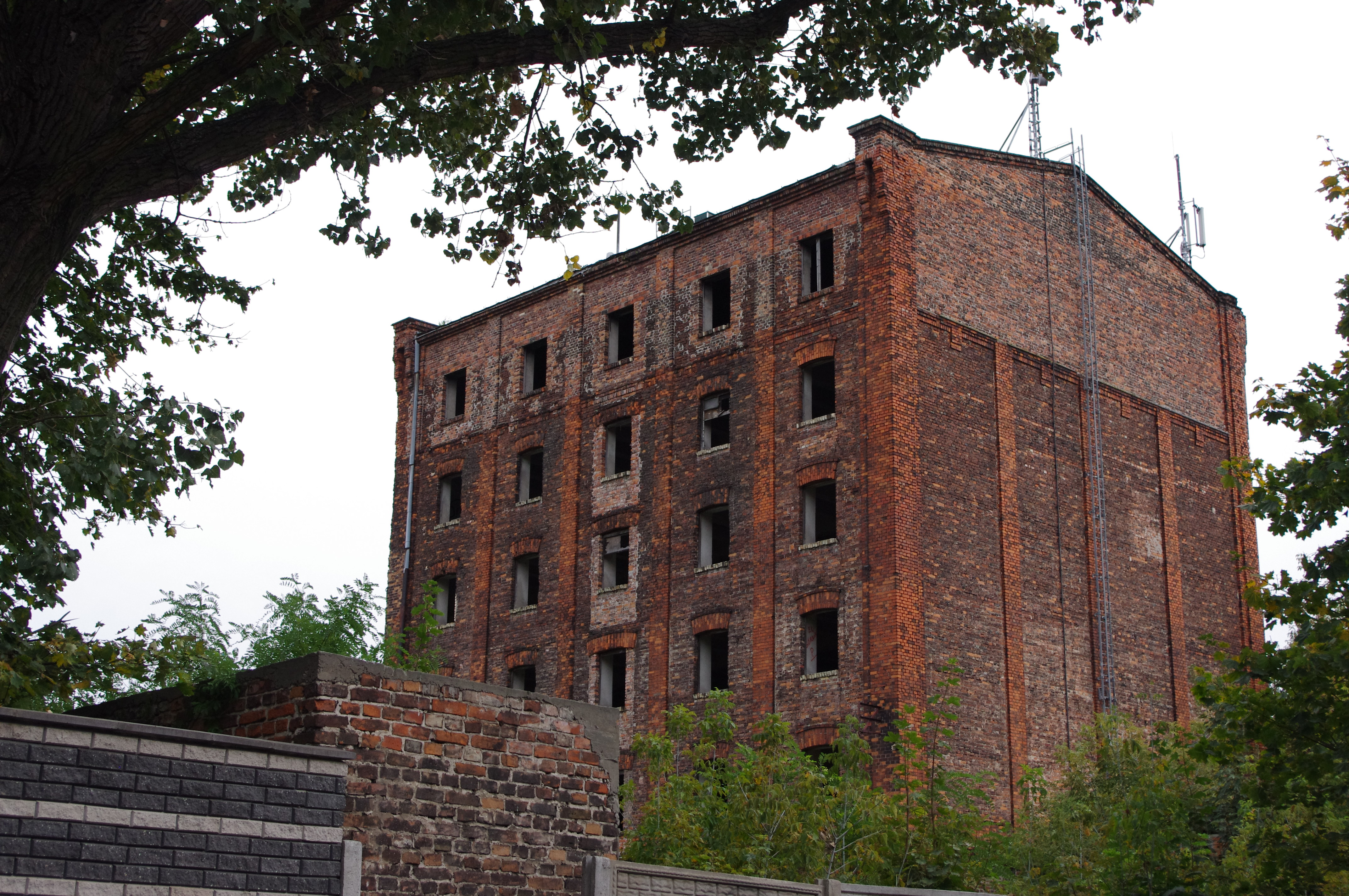 Spichrz z 1910 r., przy ul. Objazdowa 2 w Warszawie będący częścią dawnego Kompleksu młyńskiego Ludwika Michla